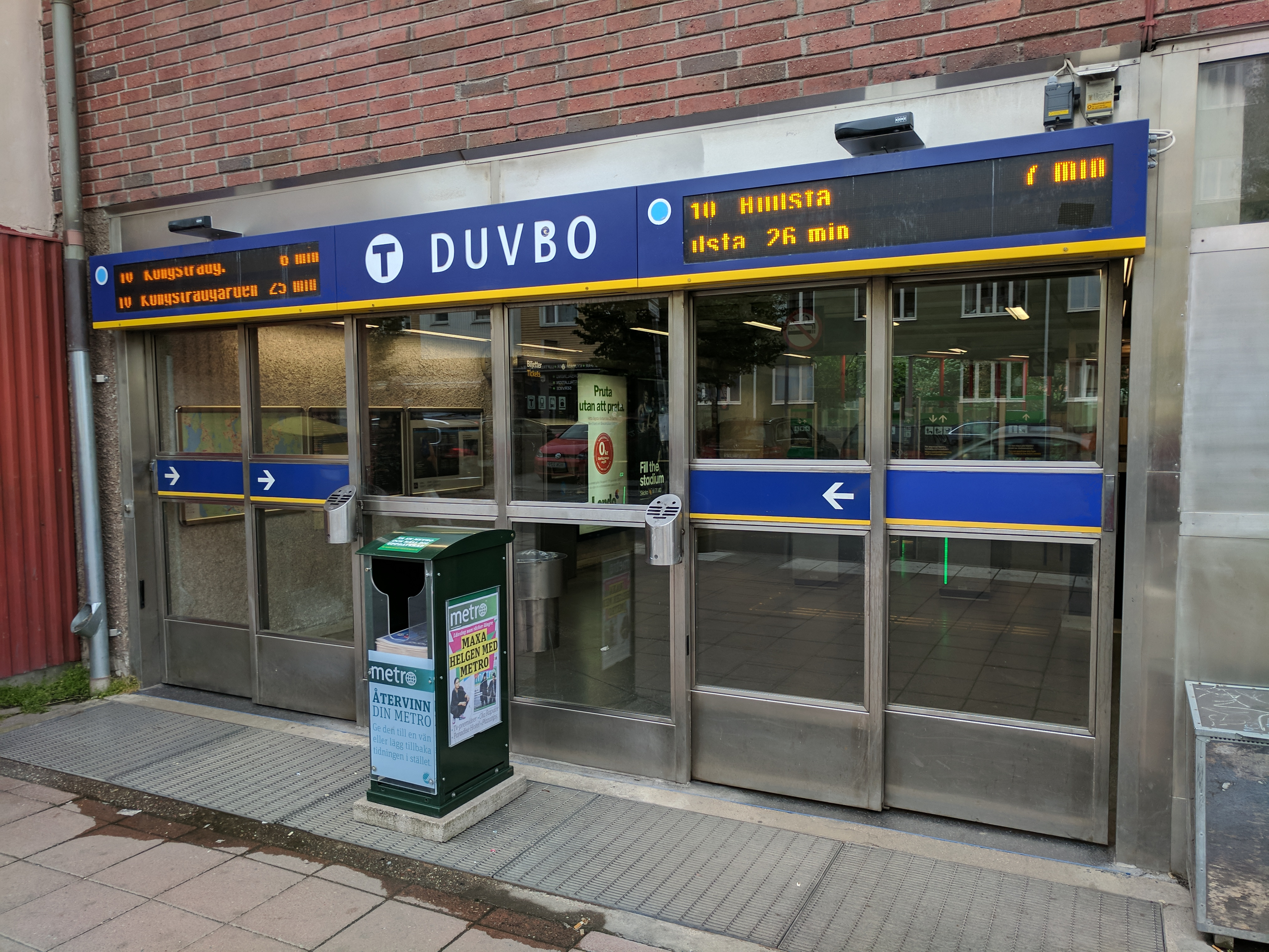 Duvbo metro 20170902